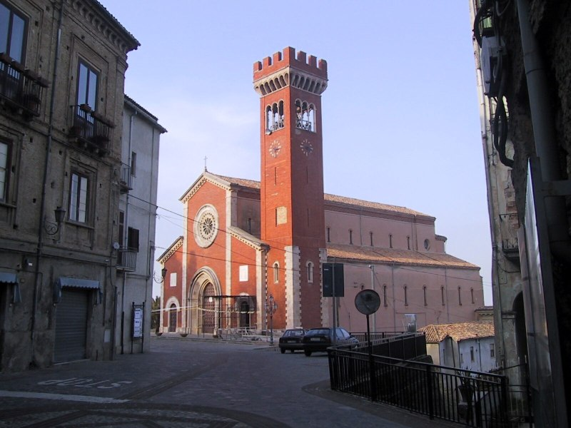 no original description(Duomo di San Marco Argentano (Diocese of San Marco Argentano-Scalea)